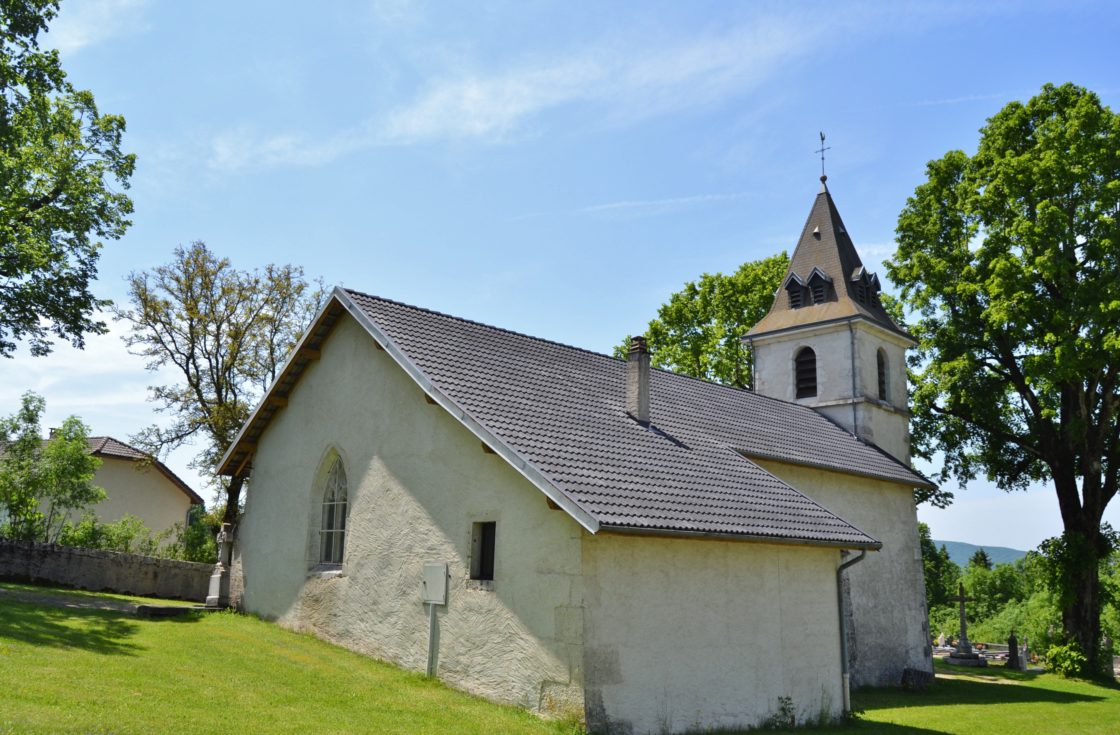 l'église